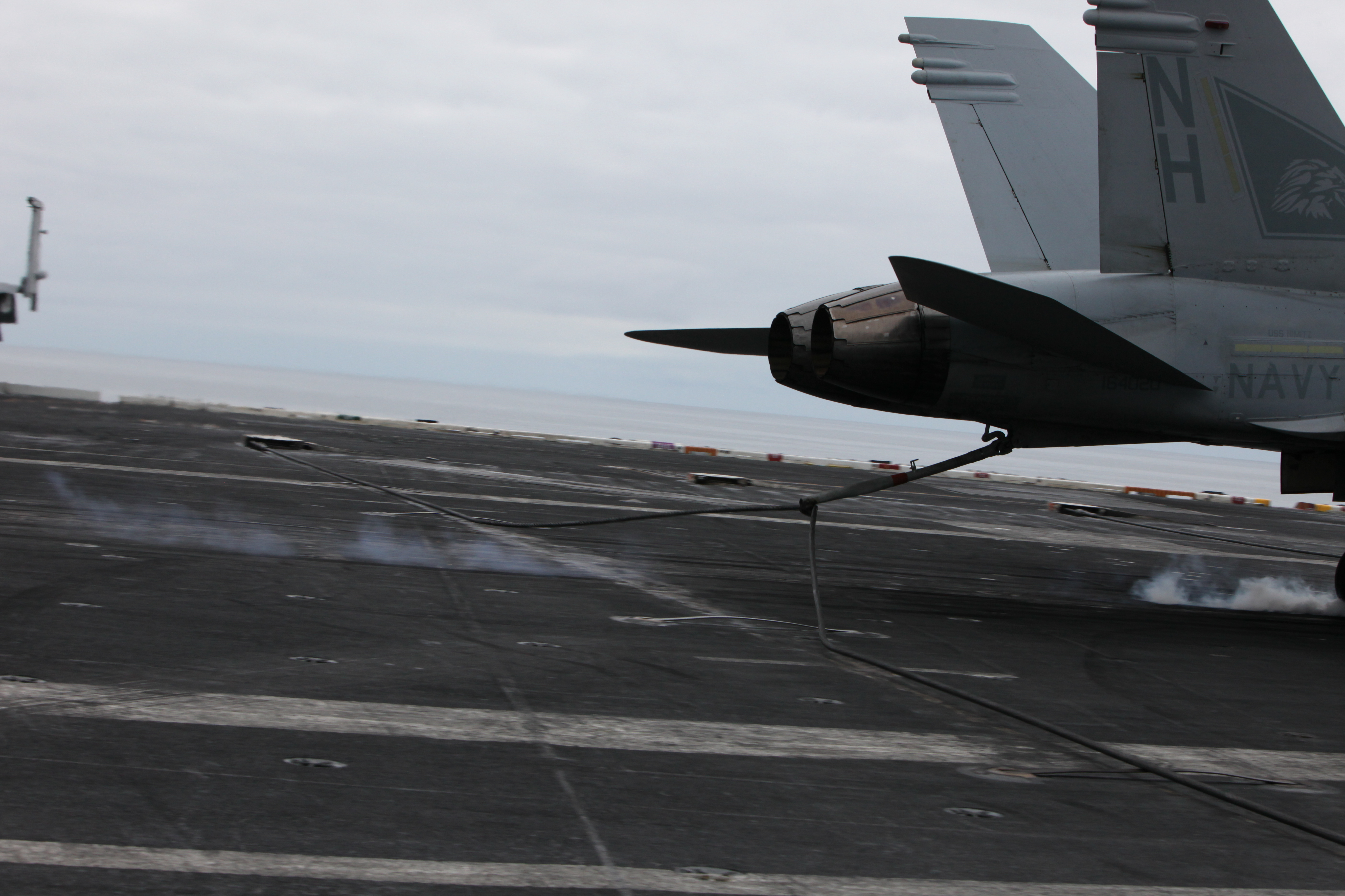 F-18 landing on USS Nimitz